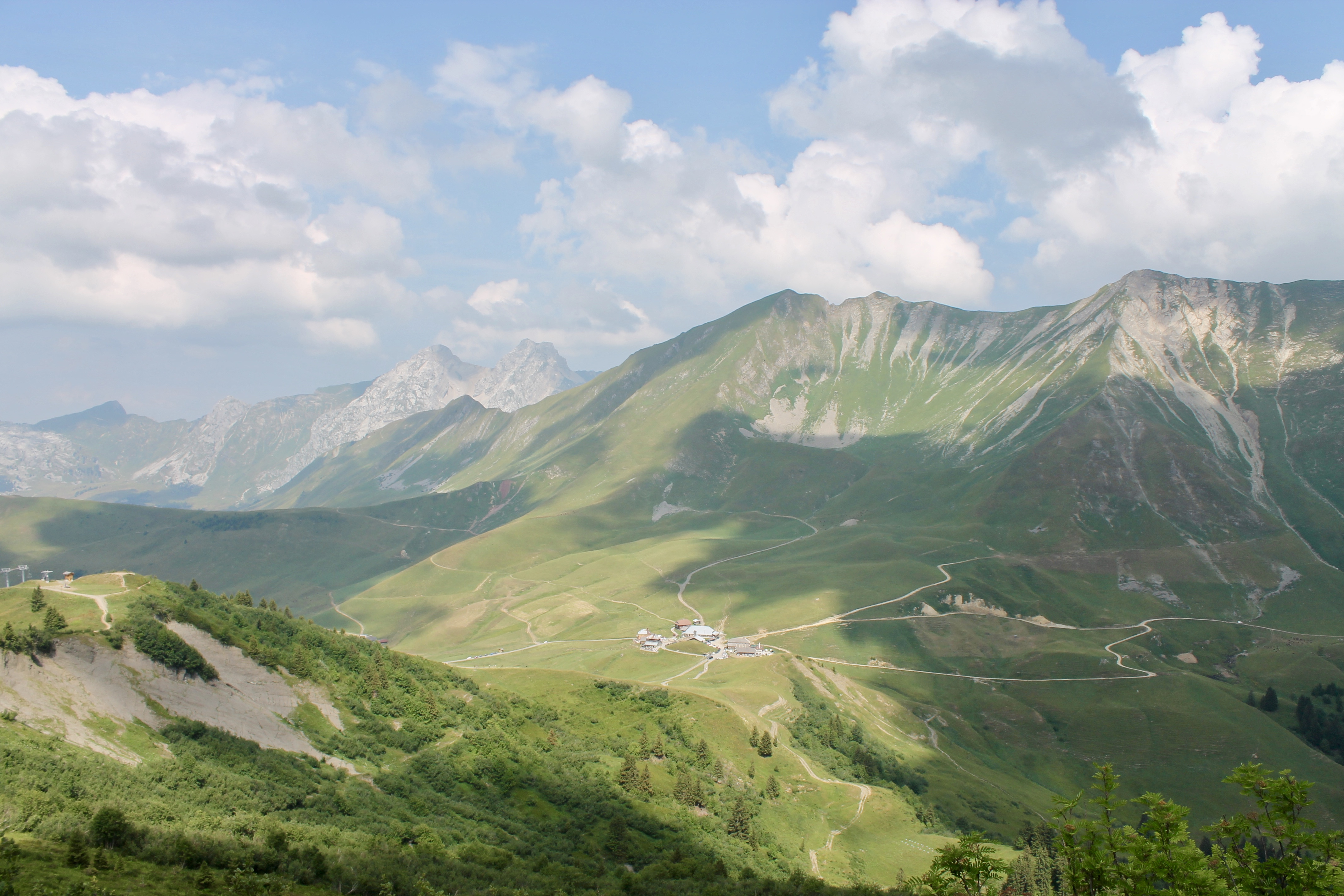 Col des Annes depuis la pointe des Delevrets. Sur la droite, la pointe d'Almet (juillet 2018).